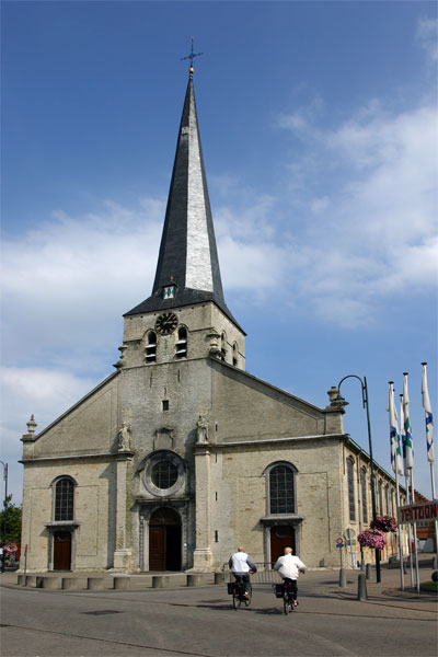 Kerk Hamme, eigen foto augustus 2004, hiermee onder GFDL gebracht